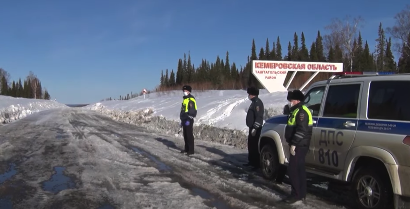 Пост ДПС, расположенный на въезде из Республики Алтай в Кемеровскую область в связи с пандемией COVID-19